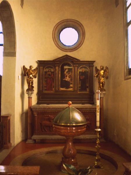 La cappella Forzatè nella chiesa di San Nicolò a Padova